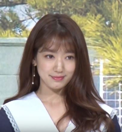 tvN '숲속의 작은 집' 제작발표회